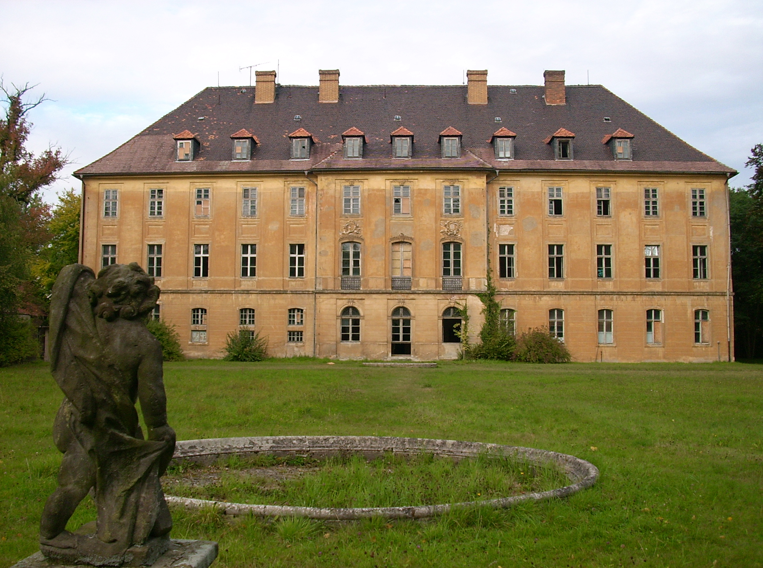 Neues Schloss in Uhyst